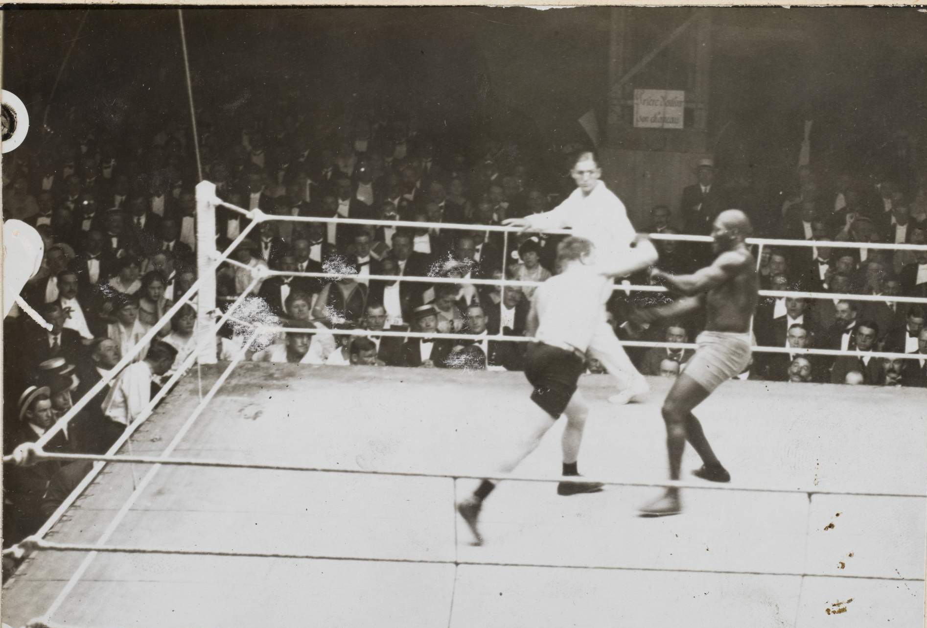 Match de boxe : Jack Johnson-Franck Mora(n). Jack Johnson vainqueur aux points 27 juin 1914.